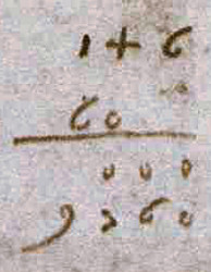 Errore in una moltiplicazione (146 * 60 = 8760)